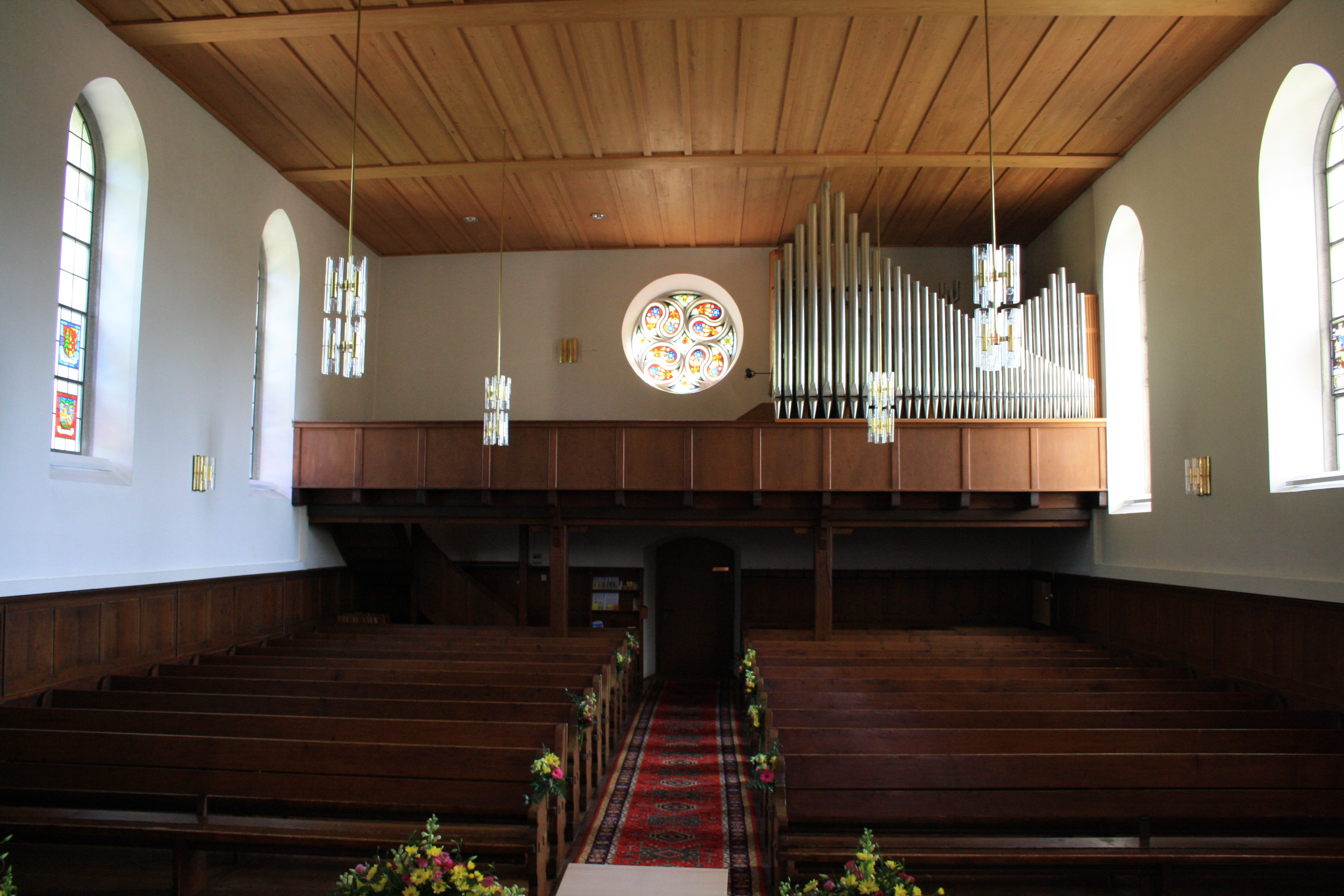 Kirchenschiff und Empore der ref. Kirche Densbüren